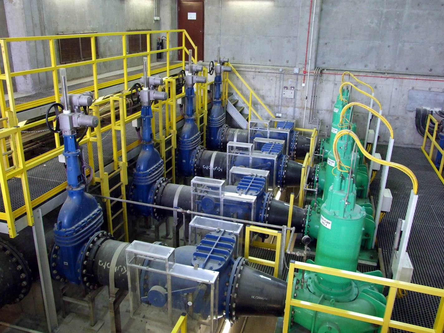 回流活性污泥泵房內設施